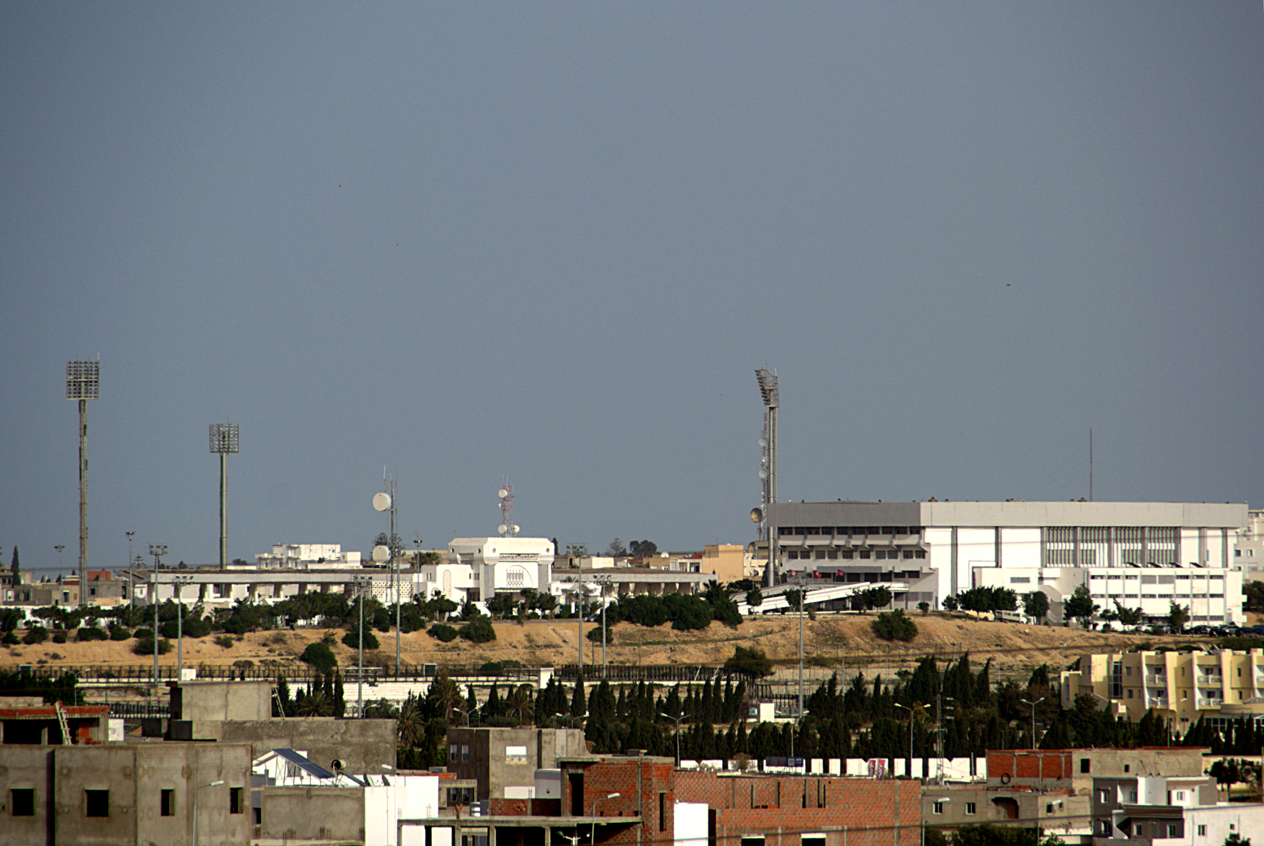 Vue de la ville de Sousse